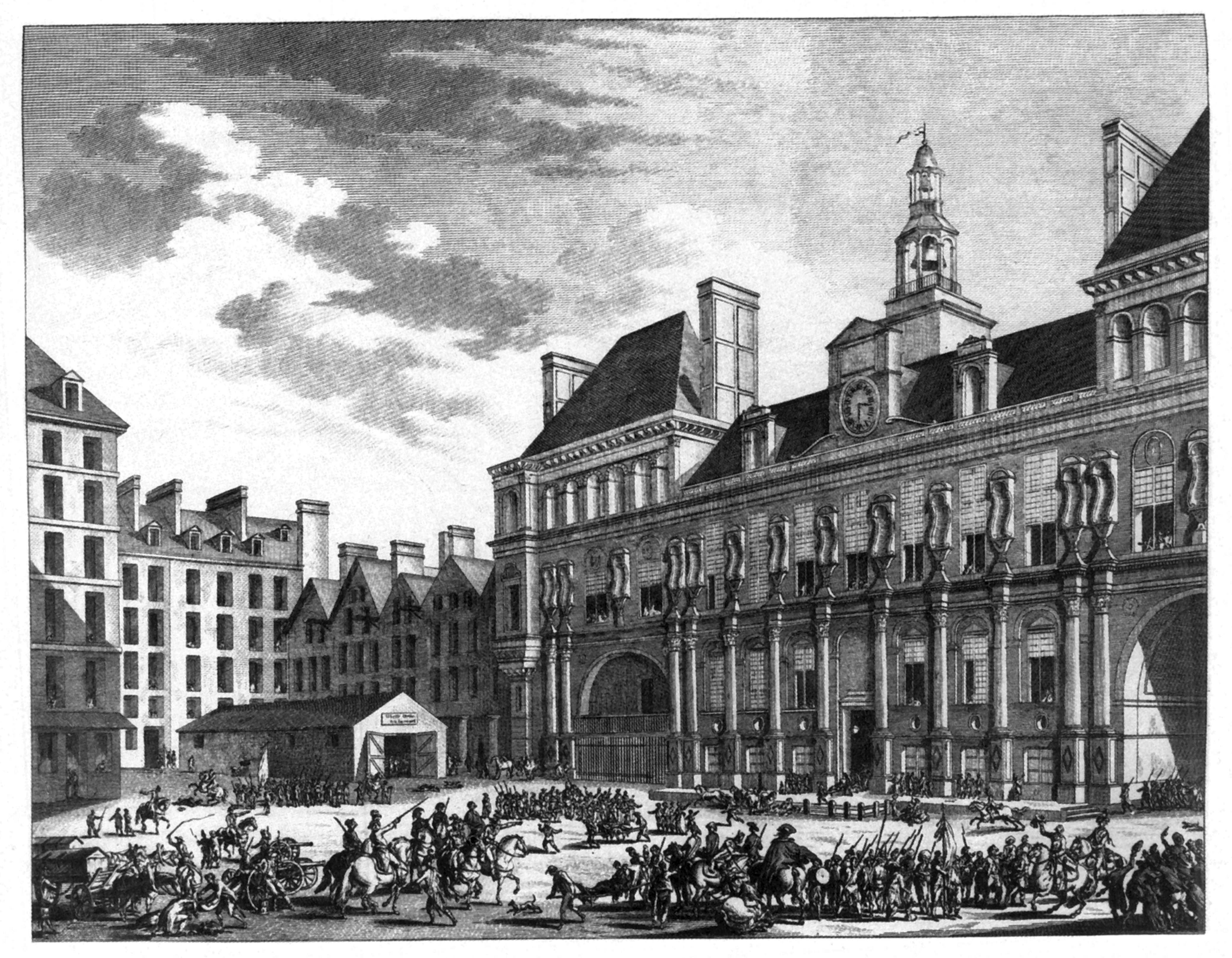 Das Volk von Paris vor dem Rathaus (9. Thermidor des Jahres II), Kupferstich, heute Sächsische Landesbibliothek